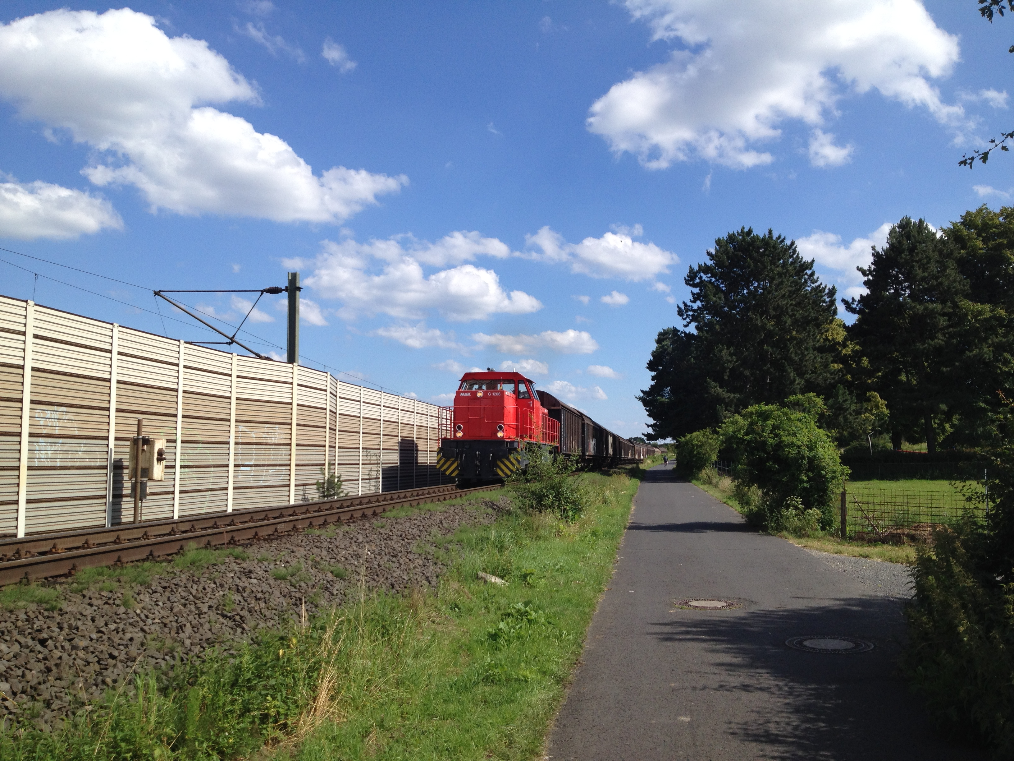 Güterzug (wahrscheinlich von VW) auf der Bahnstrecke Kassel-Naumburg, wo auch die Museumseisenbahn Hessencourrier verkehrt; rechts die Straße Am Rennsteig im Kasseler Stadtteil Süsterfeld-Helleböhn